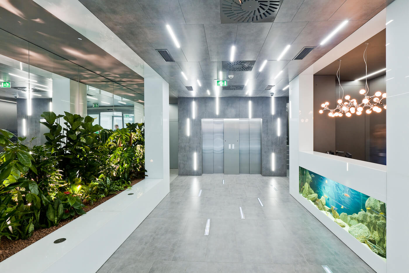 Budova Wallenrod recepcia